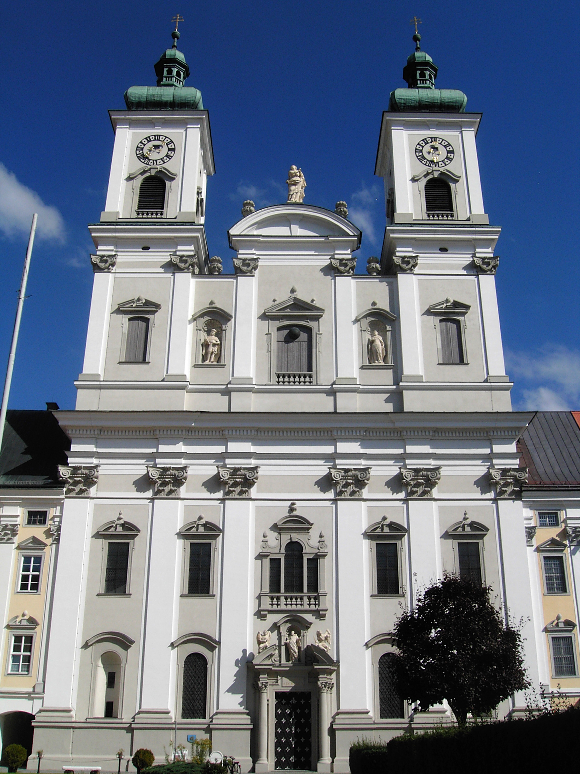 Garsten Ehemalige Klosterkirche Am Platzl Westansicht